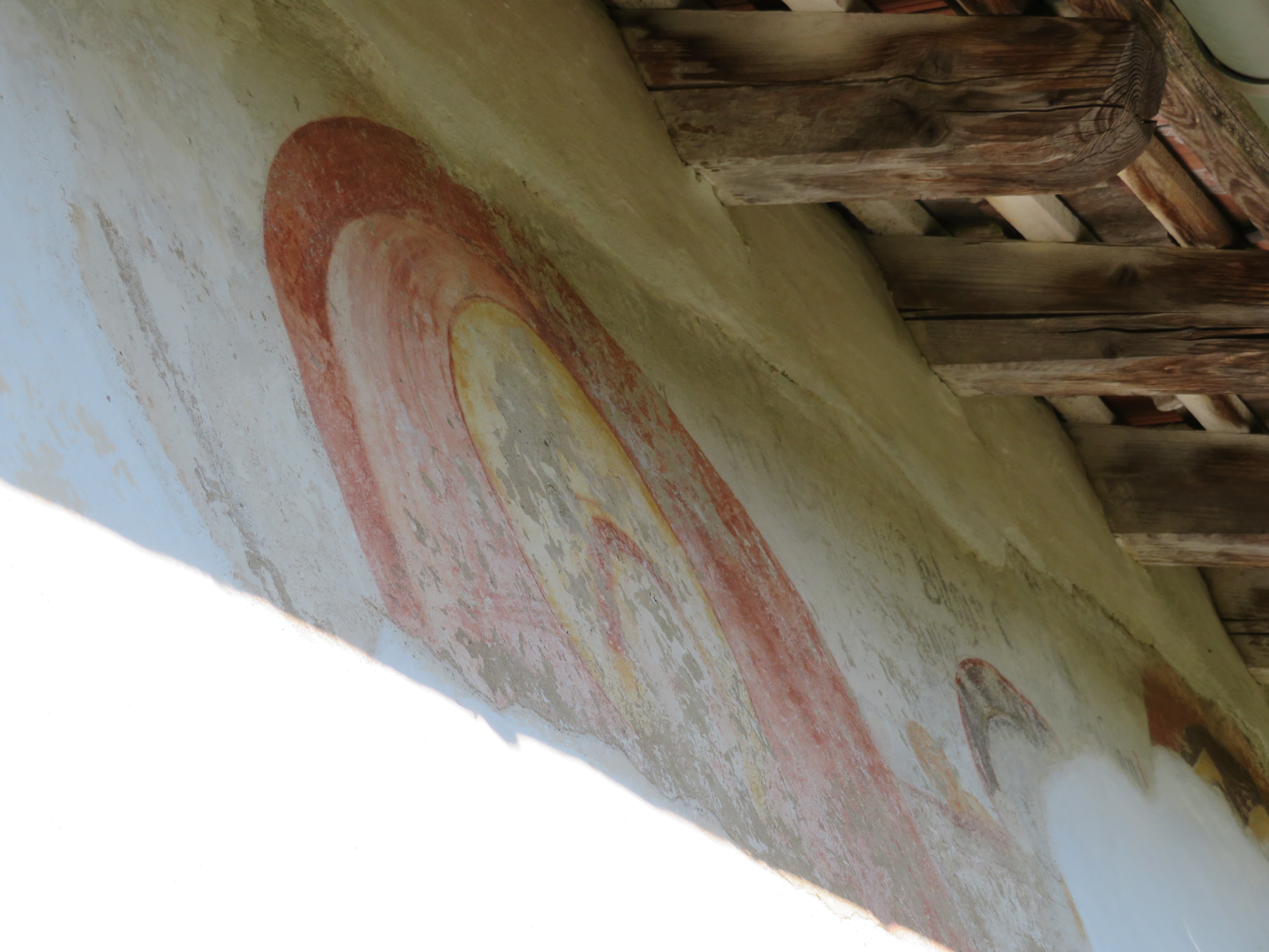 Wandmalerei